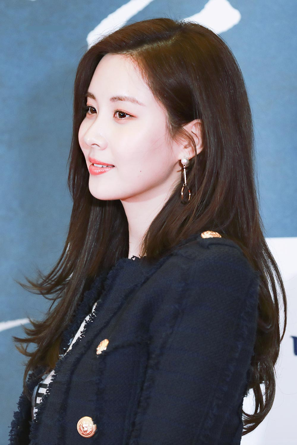 180326 7년의 밤 VIP 시사회 서현 직찍